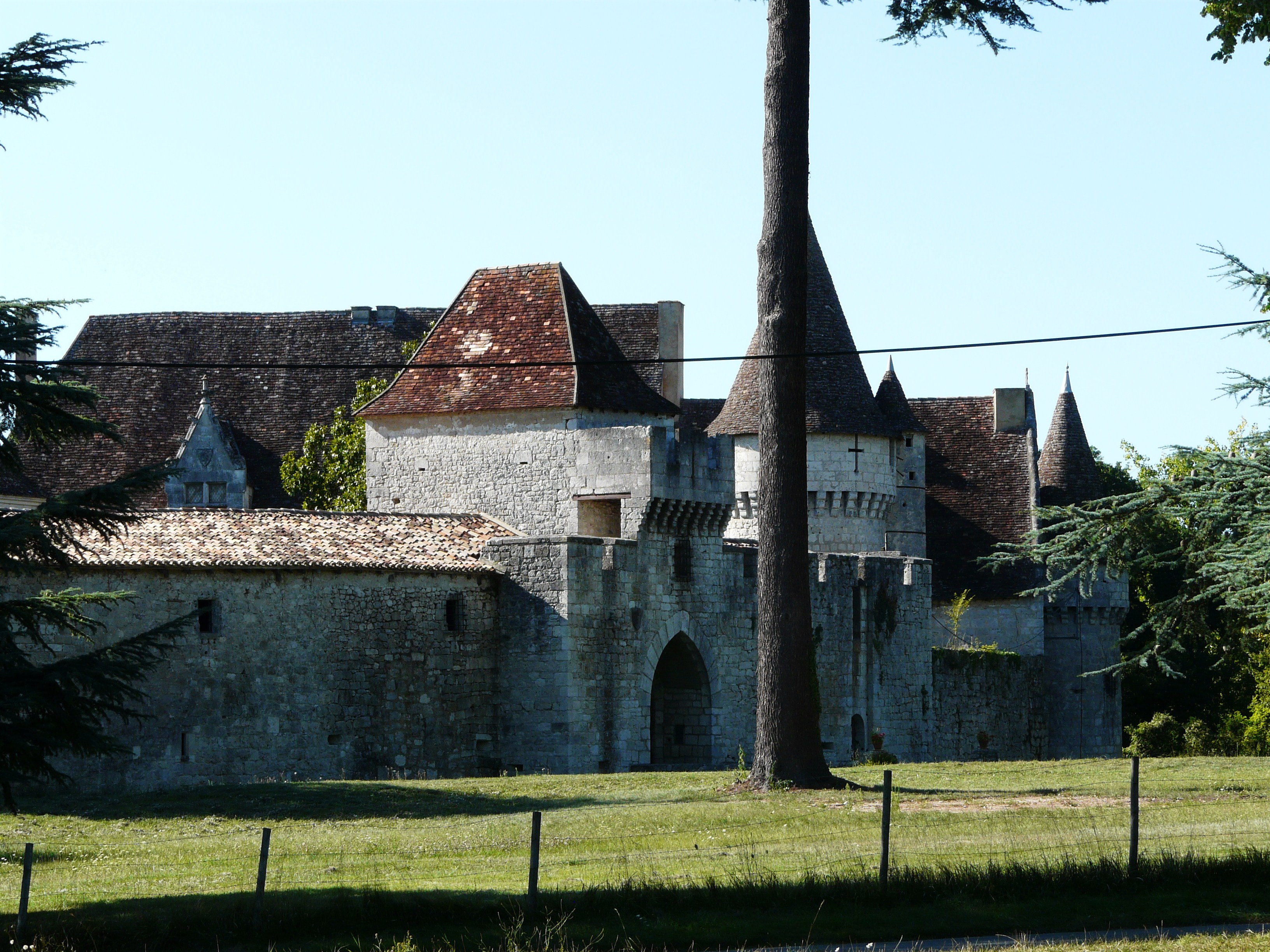 Le château de Bridoire, Ribagnac, Dordogne, France Object location44° 46′ 05″ N, 0° 27′ 32″ E